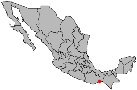 Locator map of Salina Cruz, Oaxaca, Mexico